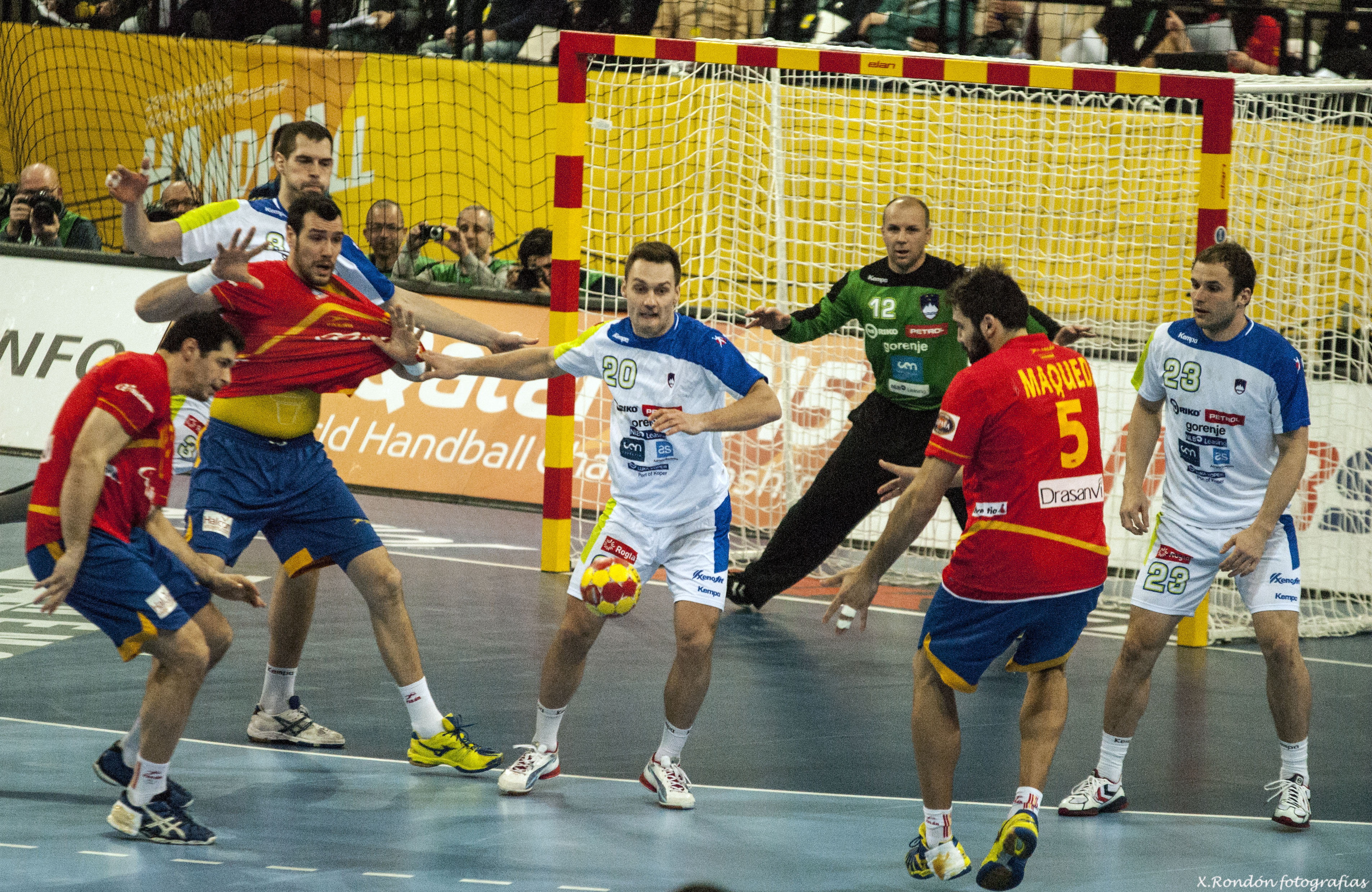 España-Eslovenia